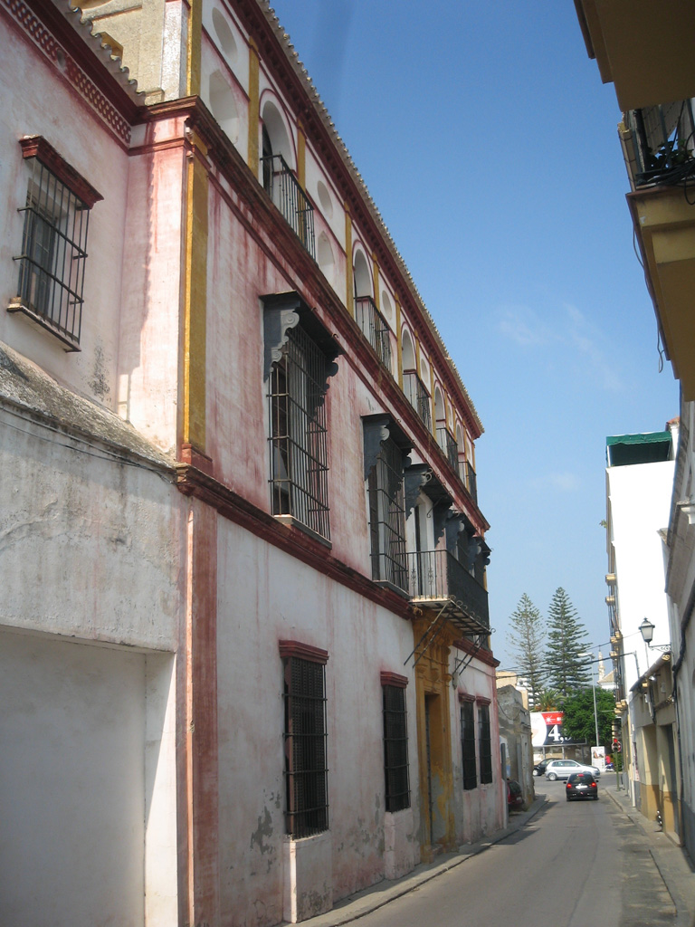 Fachada de la Casa de Arizón en Sanlúcar de Barrameda